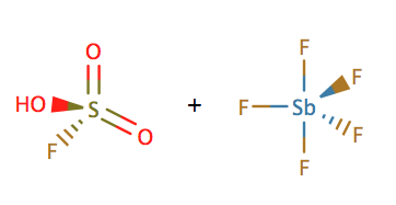 Struktuurvalem: Fluorosulfoonhape (HSO3F)ja antimonpentafluoriid (SbF5) 1:1 moolsuhtega annavad kokku maagilise happe.